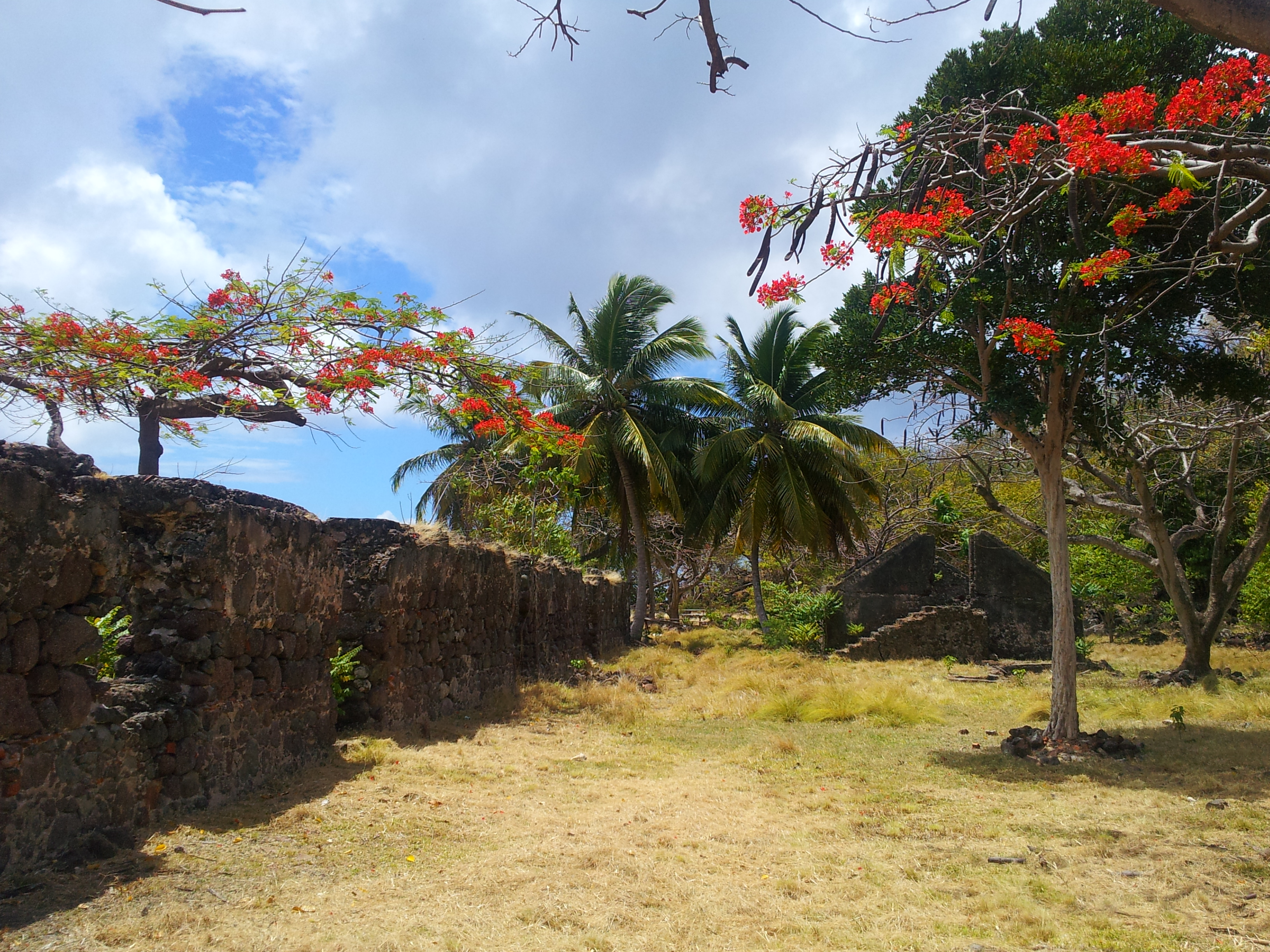 Poterie de Terre-de-Bas